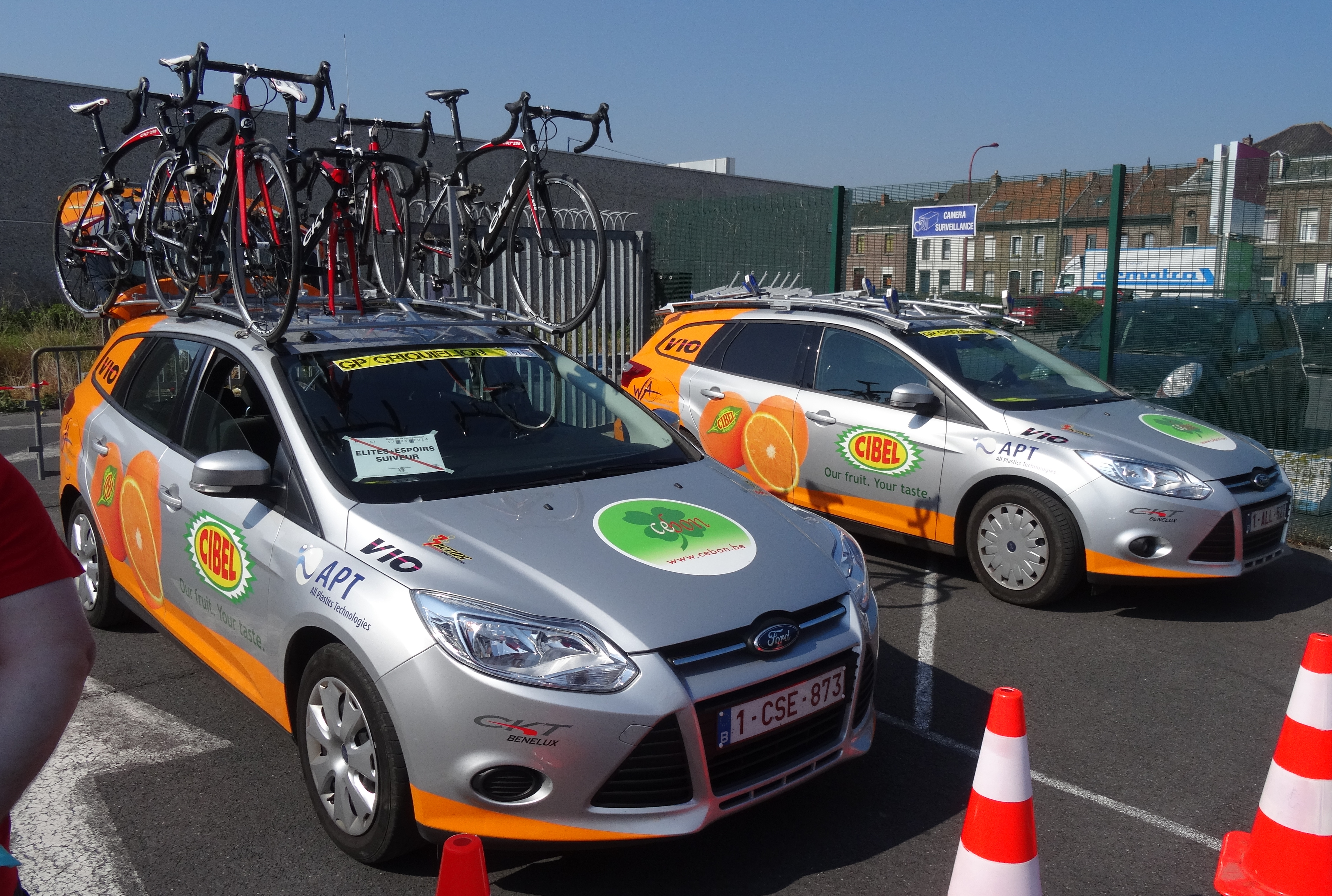 Reportage réalisé le samedi 17 mai à l'occasion du départ du Grand Prix Criquielion 2014 à Boussu, Belgique.